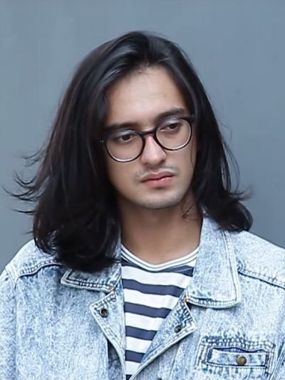 Omar Daniel di Gogirl! TV